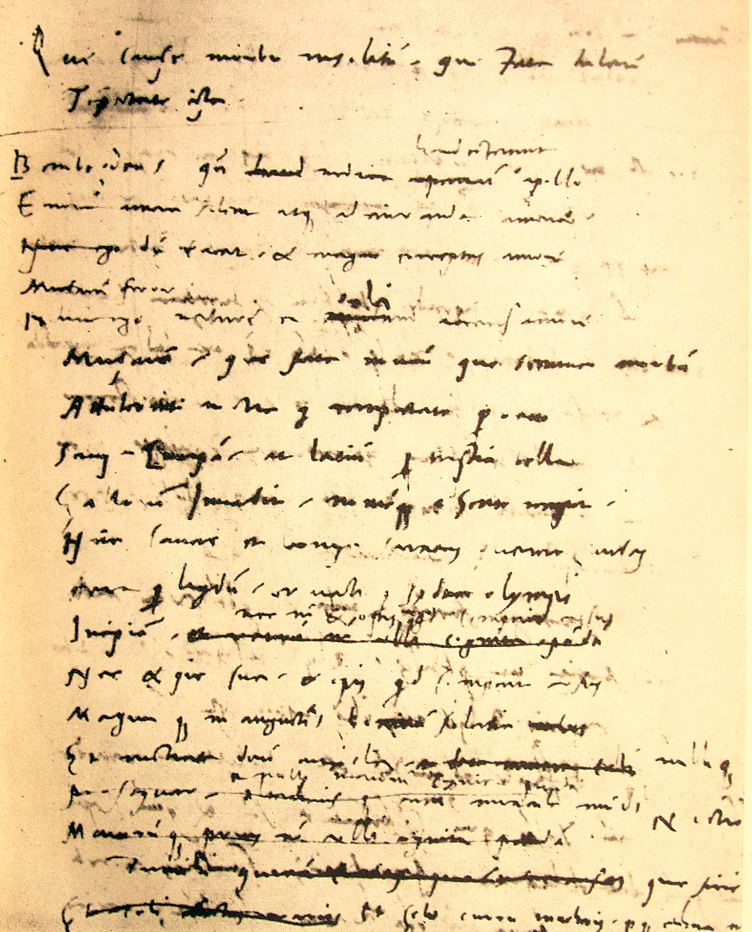 fol. 143v. «Initium Syphilidis a vulgata diversum», Cod. CCLXXV-I della Bibl. Capitolare di Verona